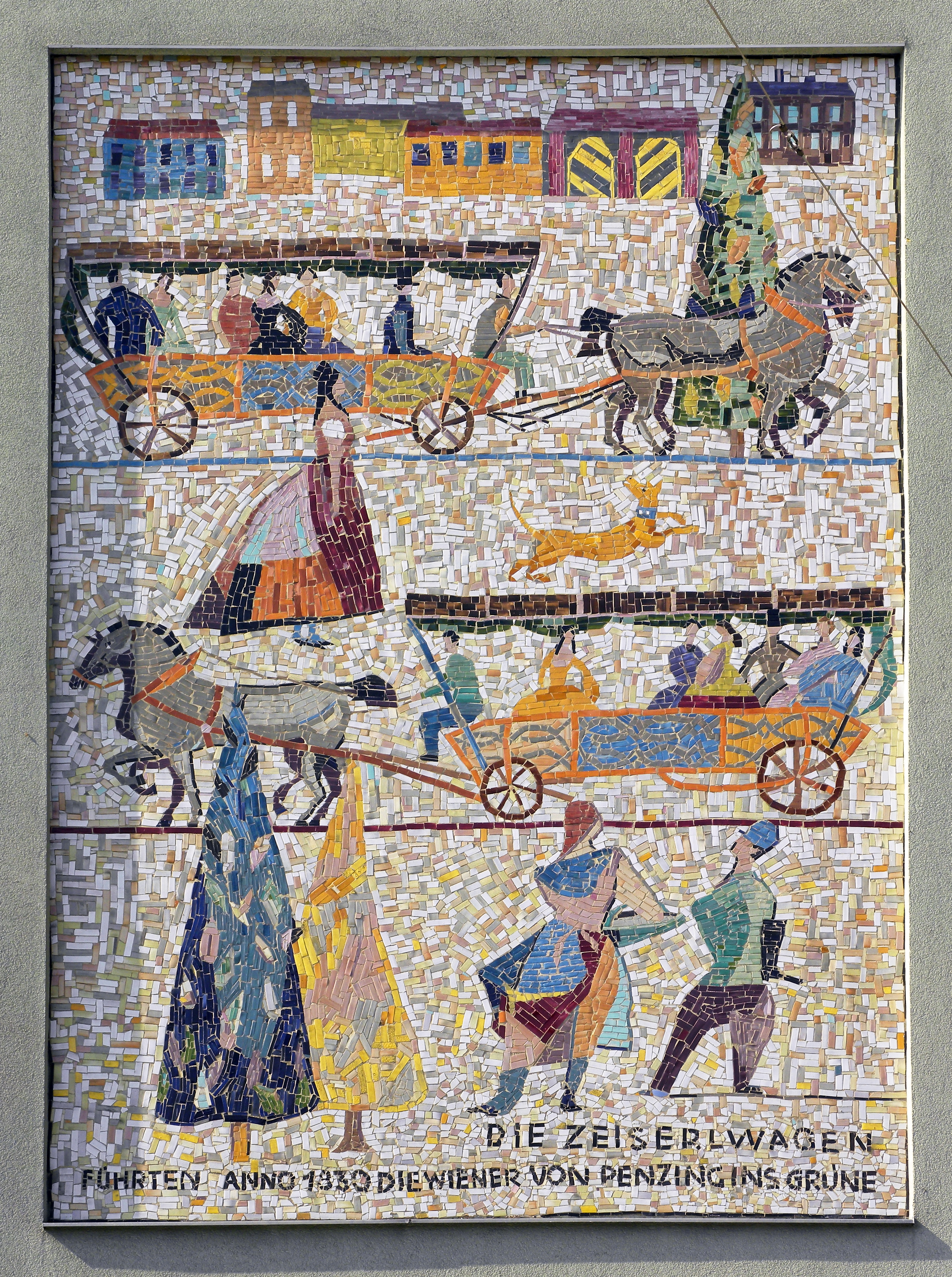 Das Mosaik "Zeiserlwagen" befindet sich in Penzing, am Gemeindebau Linzer Straße/Amortgasse/Lenneisgasse/Goldschlagstraße. Es wurde 1954 von Johanna Schidlo-Riedl geschaffen und erinnert an die ab 1825 hier verkehrende Stellwagenlinie ("Zeiserlwagen"), die die Menschen aus der Stadt zur Sommerfrische in die Vorstädte brachte. Die Linie führte aus der Stadt kommend über die Penzinger Straße bis zum Café Dommayer. [1]